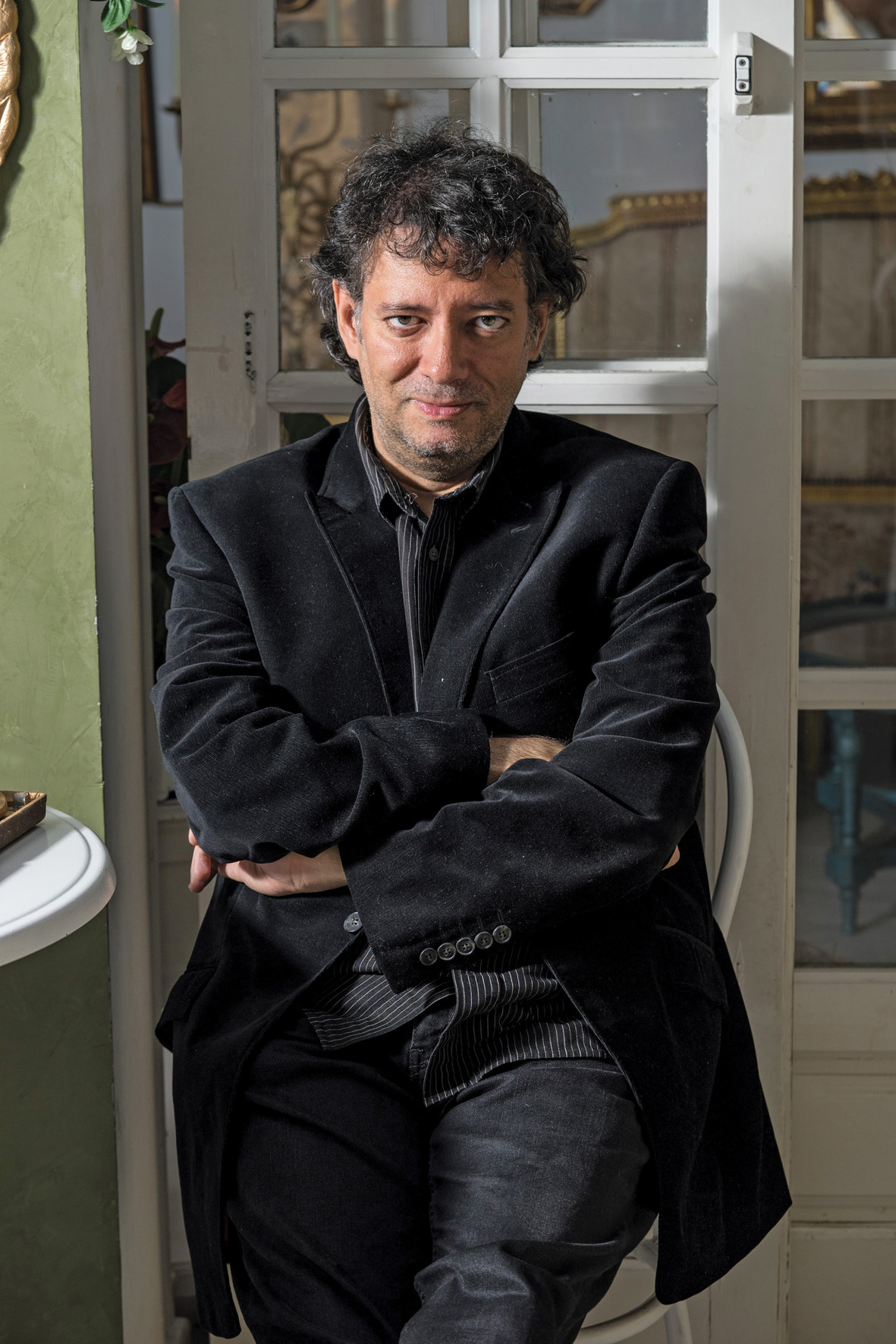 Retrato de Jose Antonio Cotrina, escritor español de fantasia, ciencia-ficción y terror.